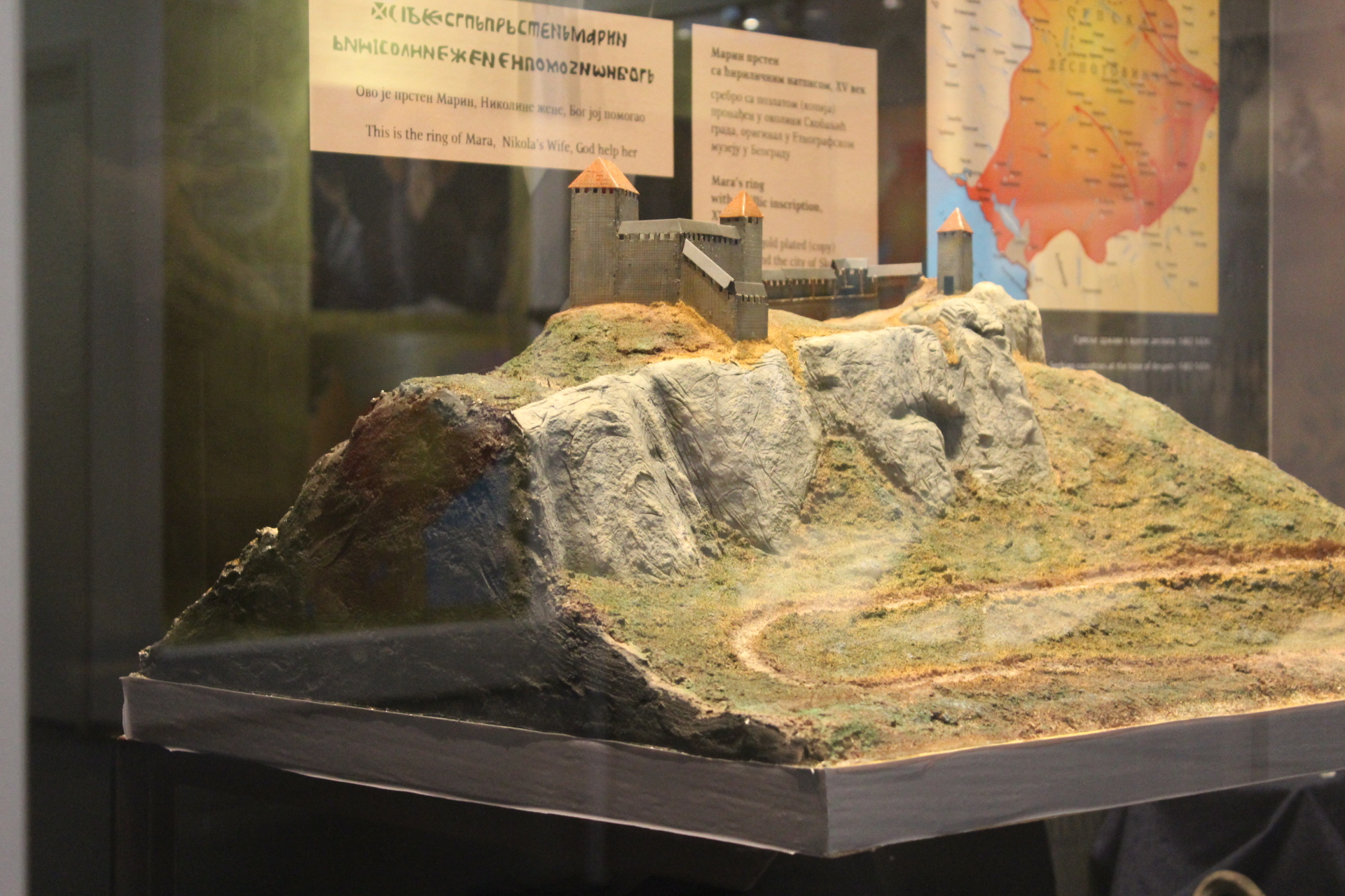 Srpski (latinica): Rekonstukcija Skobaljić grada. Tematska celina Srednji vek.